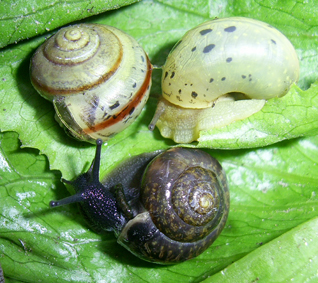 Равлик чагарниковий (звичайний) Fruticicola fruticum (Müller, 1774)